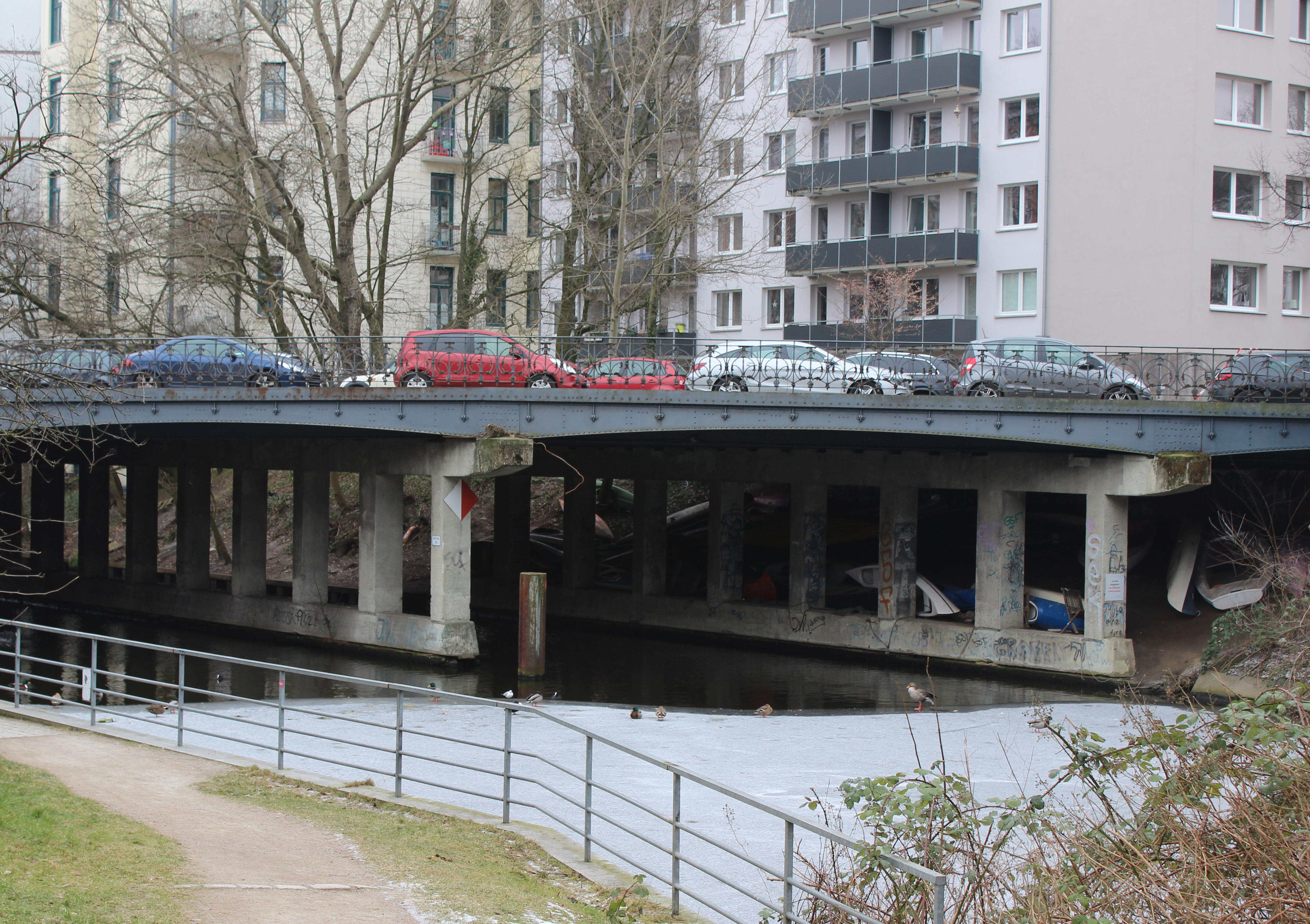 Straßenbrücke über die Isebek in Hamburg-Harvestehude